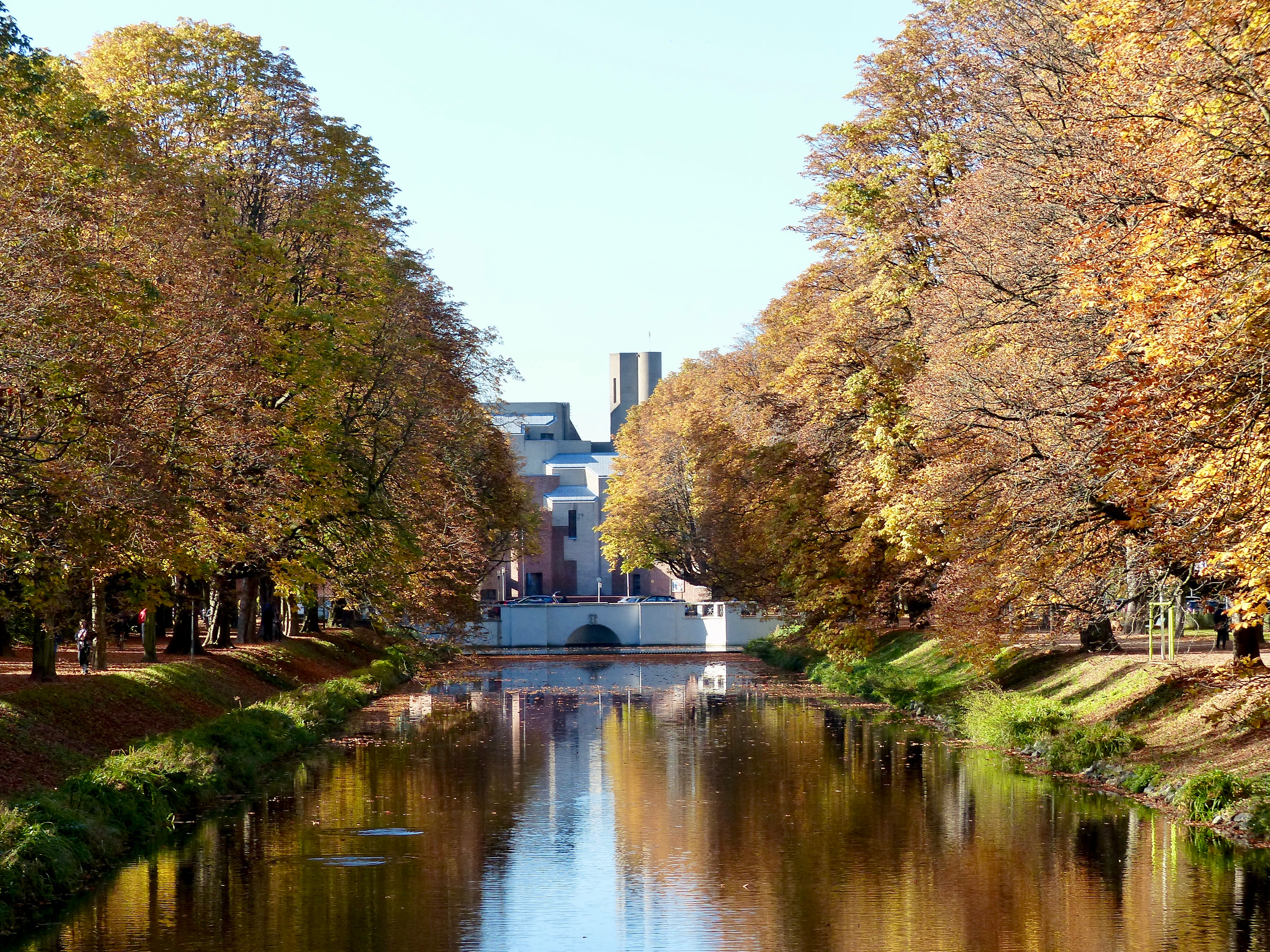 Clarenbachkanal, Ende Oktober 2016, LB 3.02 „Clarenbach/Rautenstrauch-Kanal westlich des Aachener Weihers“